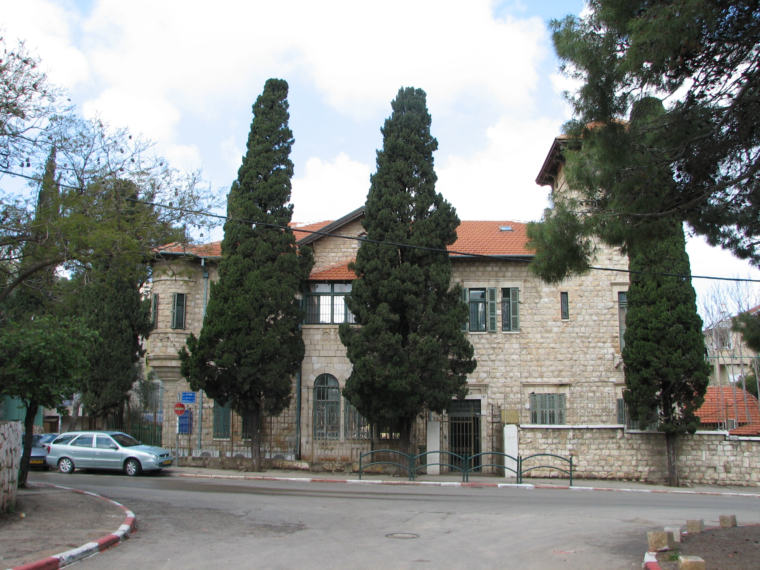 House of Yehuda Eitinת Hadar, Haifa Israel בית יהודה איתין, נבנה בשנים 1920-1919 . האדריכל היה גדליהו ווילושביץ, בין השנים 1922 ועד 1942 שימש כבית חולים הדסה ולאחריו בית חולים רוטשילד. הבית שוכן ברחוב שמריהו לוין 30, בשכונה ההיסטורית הטכניקום שנבנתה ליד הטכניון חזית מרחוב שמריהו לוין